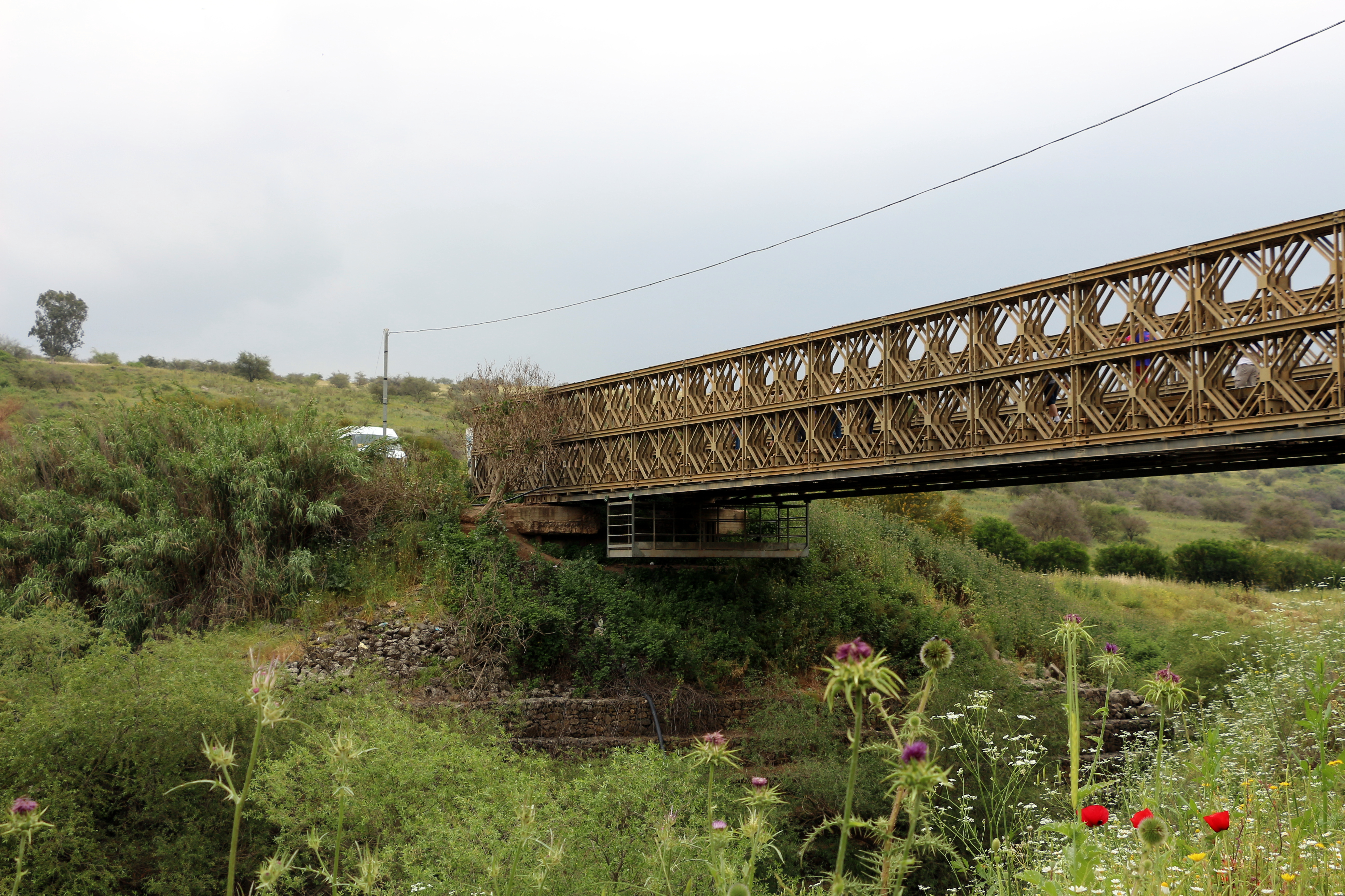 גשר בנות יעקב\Bnot Ya'akov Bridge